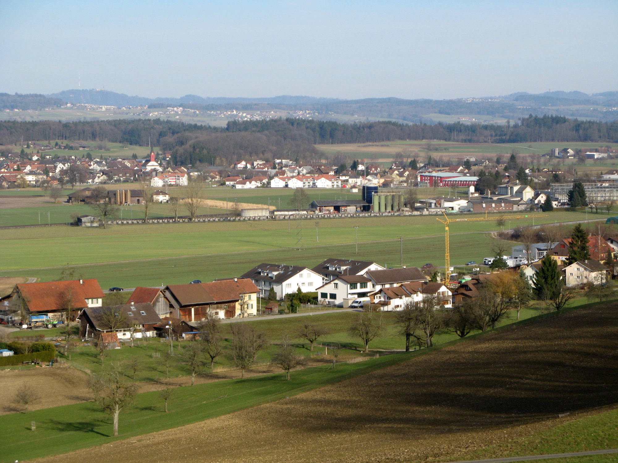 Ansicht von Waltenschwil, im Vordergrund Büelisacher